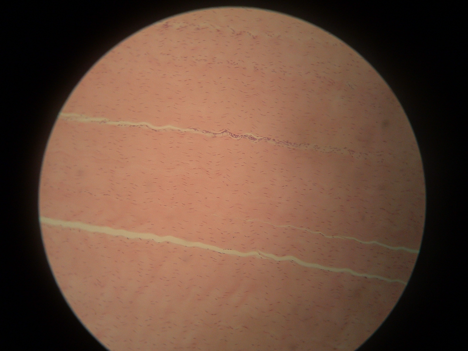 Glaudusis jungiamasis audinys